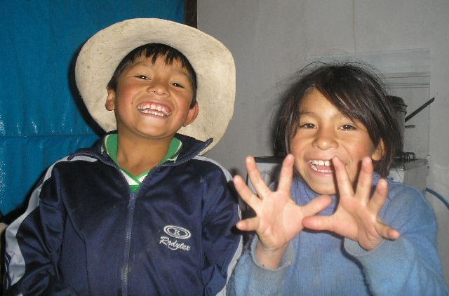 Dos niños del Cuzco, sonriendo.